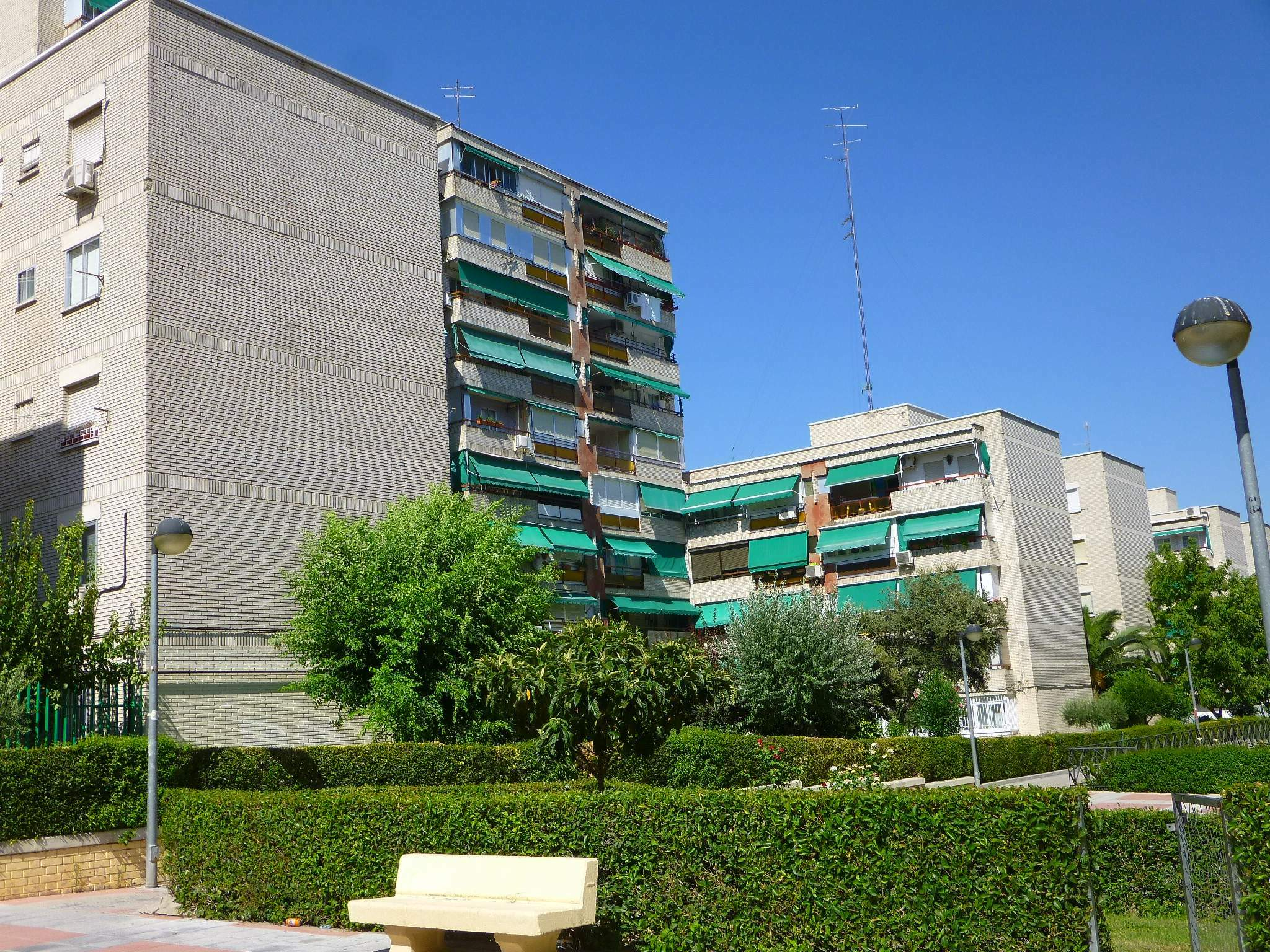 Leganés (Madrid) - Barrio de Zarzaquemada